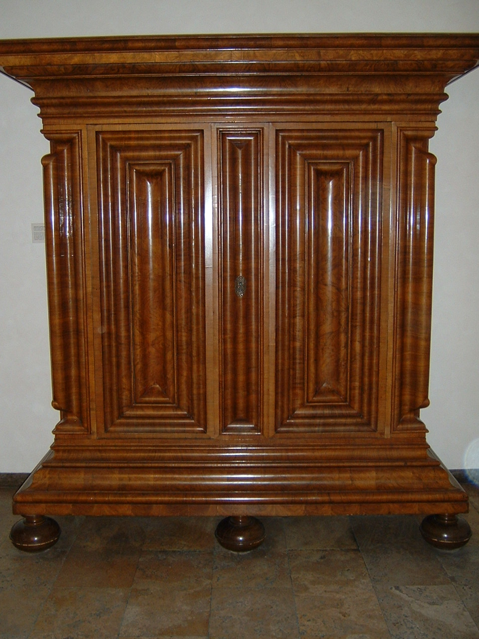 Frankfurter Schrank, sogenannter Nasenschrank, Barock, Standort: Römer Frankfurt vor Standesamt.